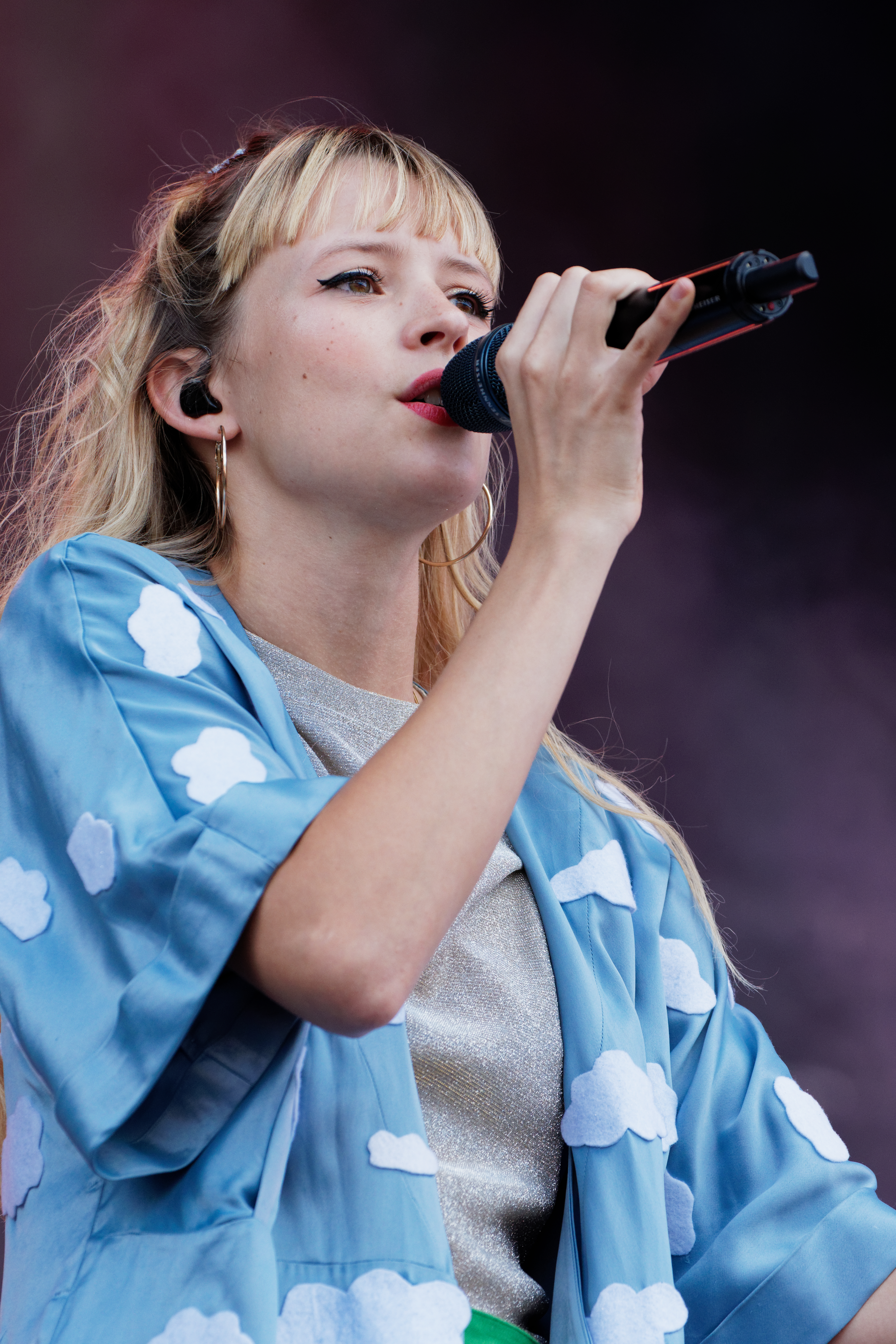 Angèle en concert lors du festival des vieilles charrues 2018.